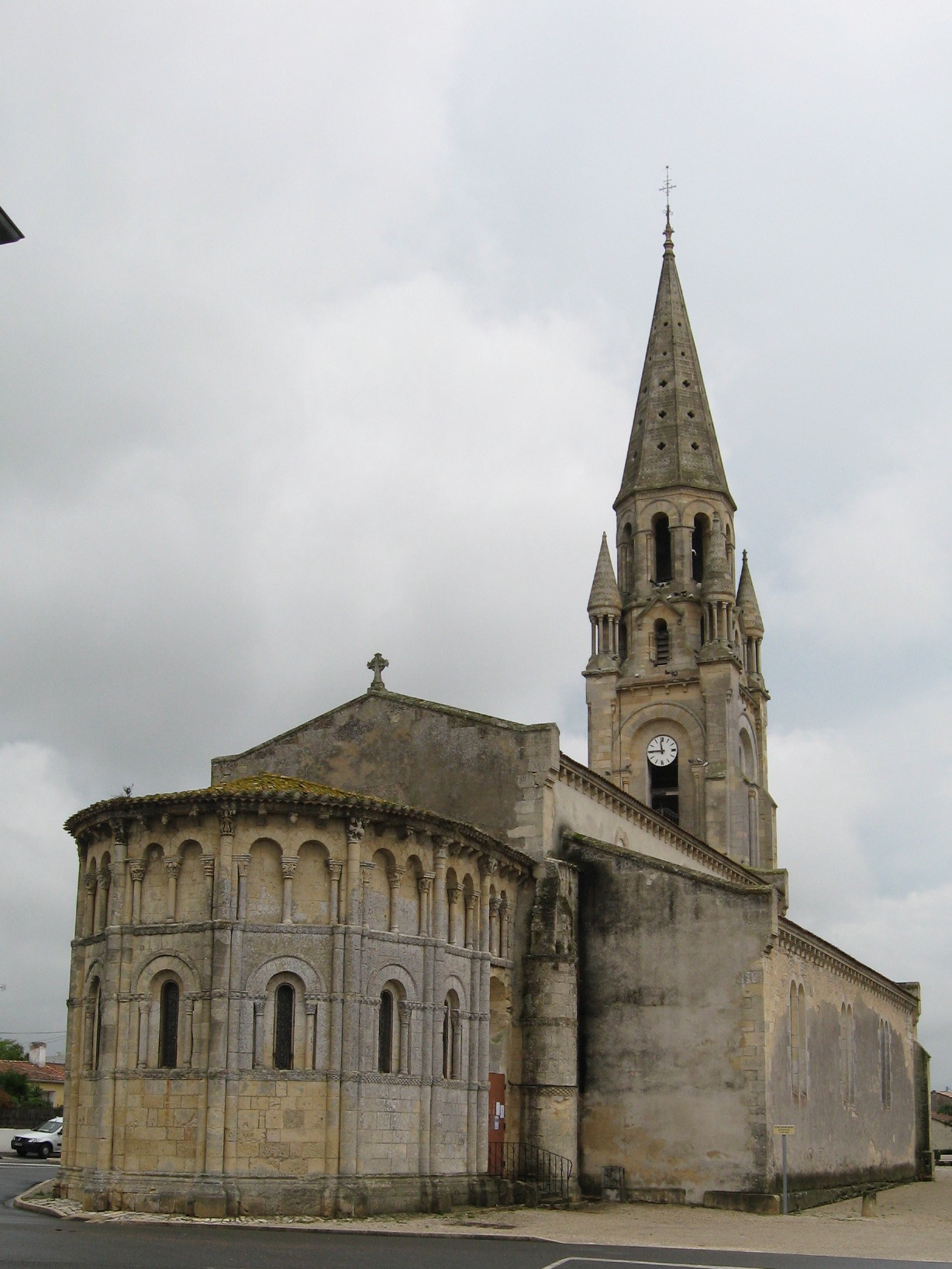 De l’église du 12e s, reconstruite dans la seconde moitié du 19e s ne subsiste que le chœur. Vue du nord est. CMH 1862. .